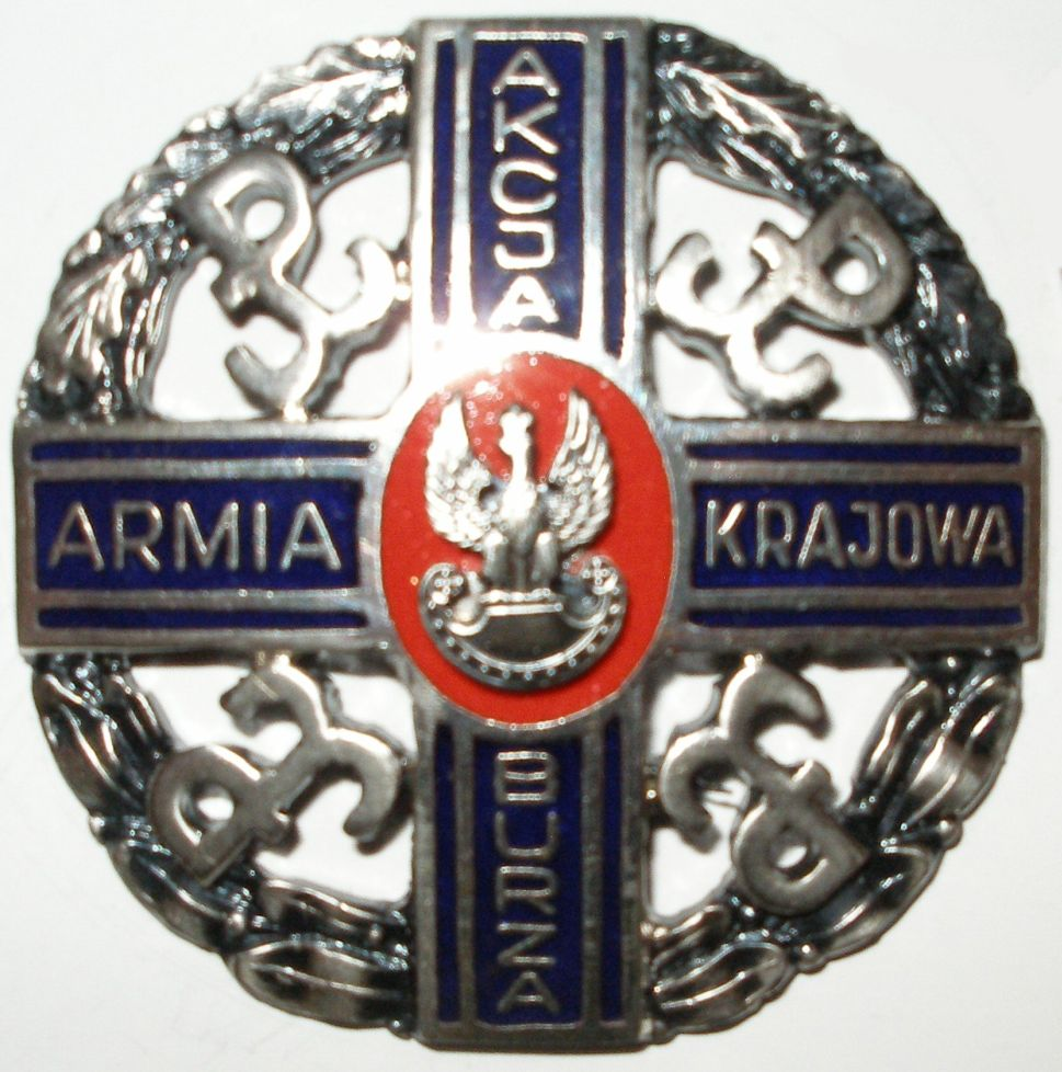 odznaka AK, przyznana J. Pertkiewiczowi za "Akcję Burza"